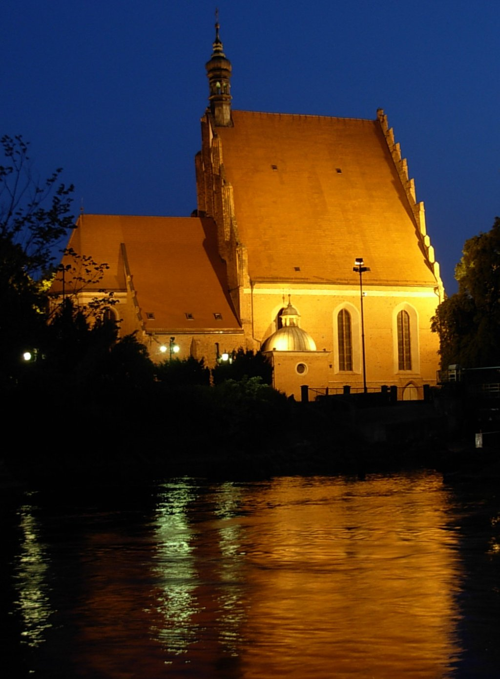 Katedra Bydgoska p.w. św. Marcina i Mikołaja (1466 r.) - stan obecny o zmierzchu